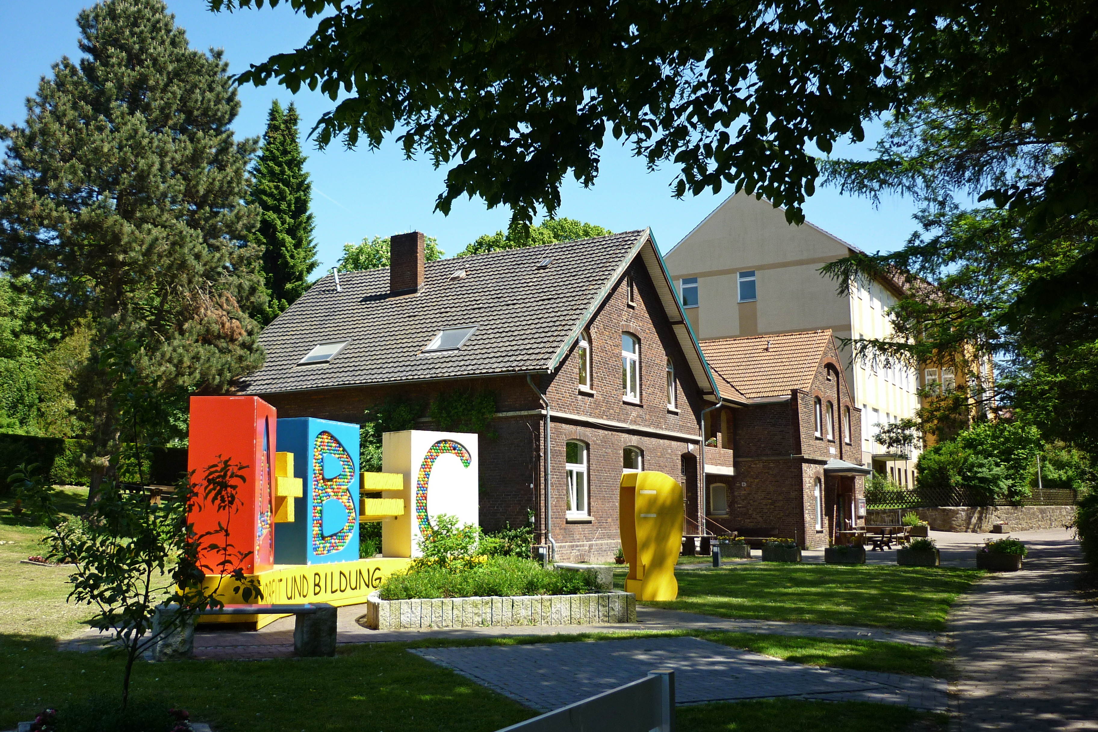 Bad Oeynhausen. Diakonische Stiftung Wittekindshof, Dorfplatz.